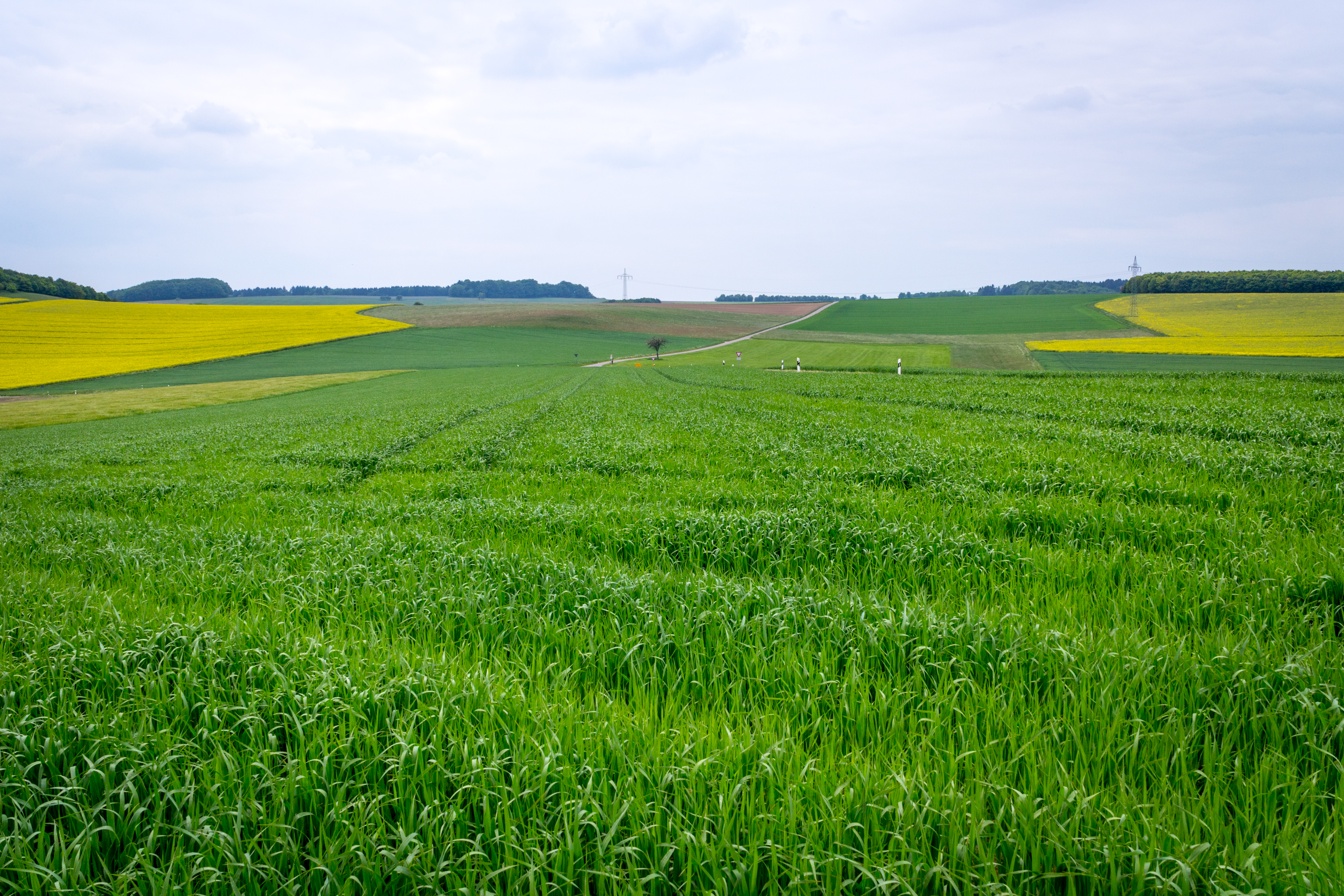 Naturpark Saar-Hunsrück Zerf Heltern Feld und Kreuzung